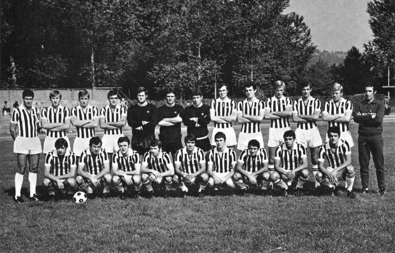 La rosa della Juventus nella stagione 1970-71. Da sinistra, in piedi: S. Salvadore (capitano), G. Marchetti, G. Roveta, A. Cuccureddu, M. Piloni, R. Tancredi, G. Ferioli, F. Landini (II), R. Bettega, F. Morini, L. Spinosi (II), H. Haller, A. Picchi (allenatore); accosciati: G. Zaniboni, G. Savoldi (II), R. Montorsi, A. Novellini, P. Anastasi, L. Danova, G. Furino, F. Causio, F. Capello.